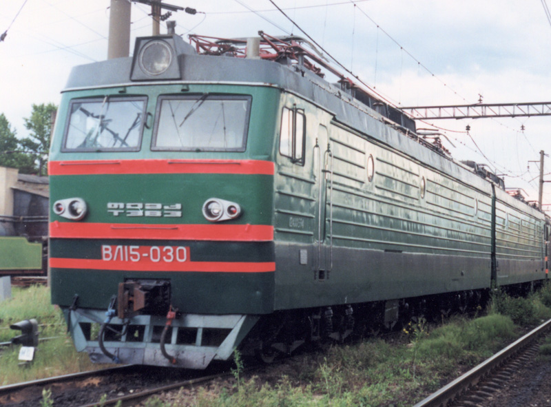 Электровоз ВЛ15-030